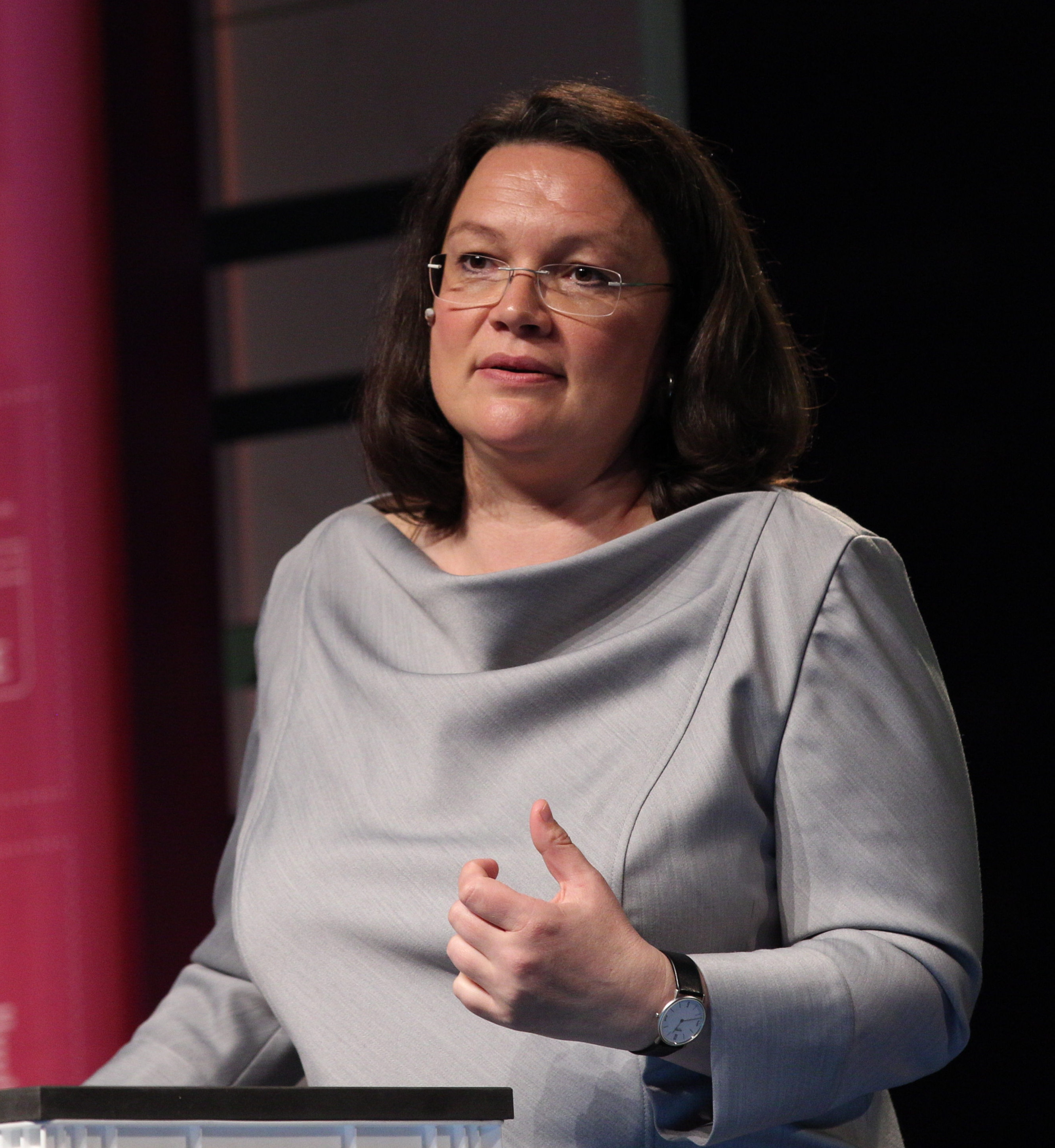 Andrea Nahles (Bundesministerin für Arbeit und Soziales) auf der re:publica 17